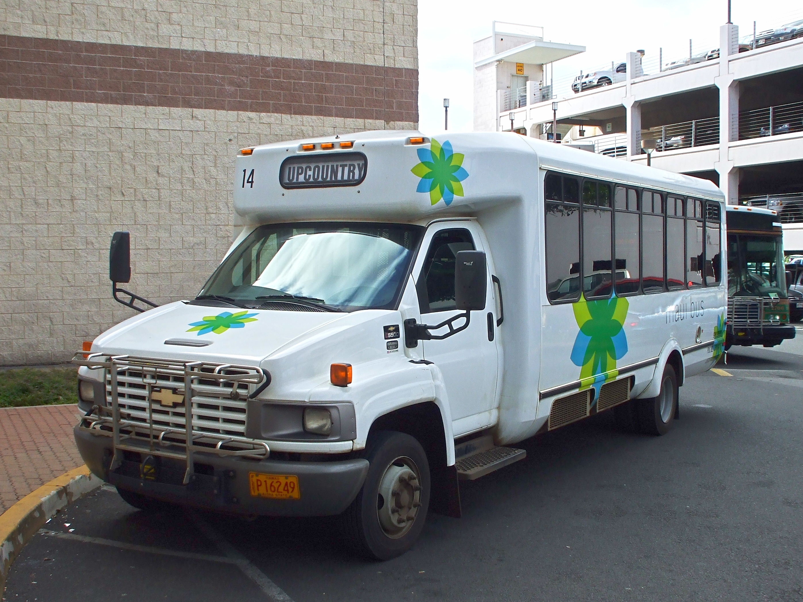 Maui Bus. ElDorado AeroElite Bus.